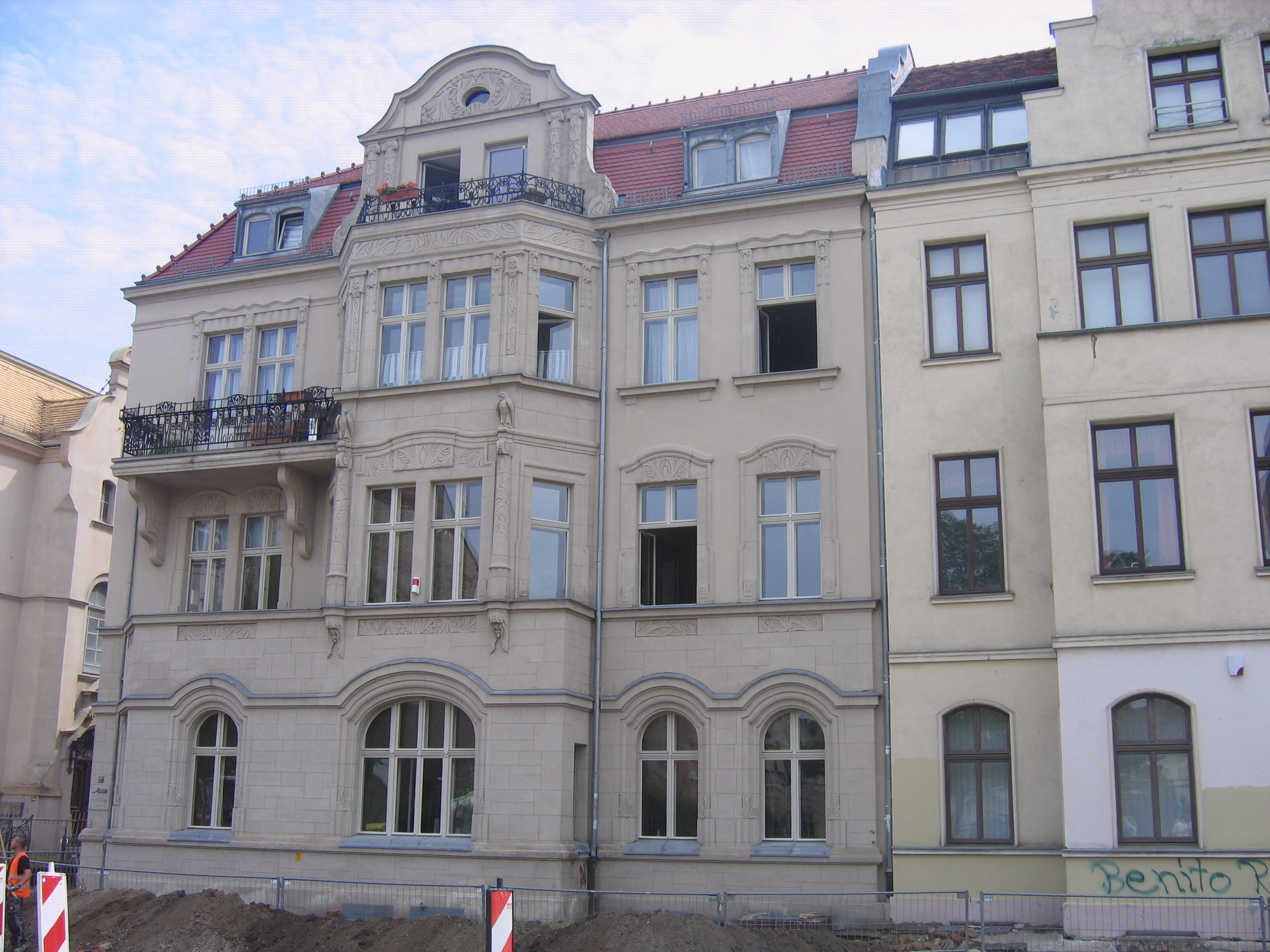 Denkmalgeschütztes Mietwohnhaus Bahnhofstraße 27 in Cottbus.